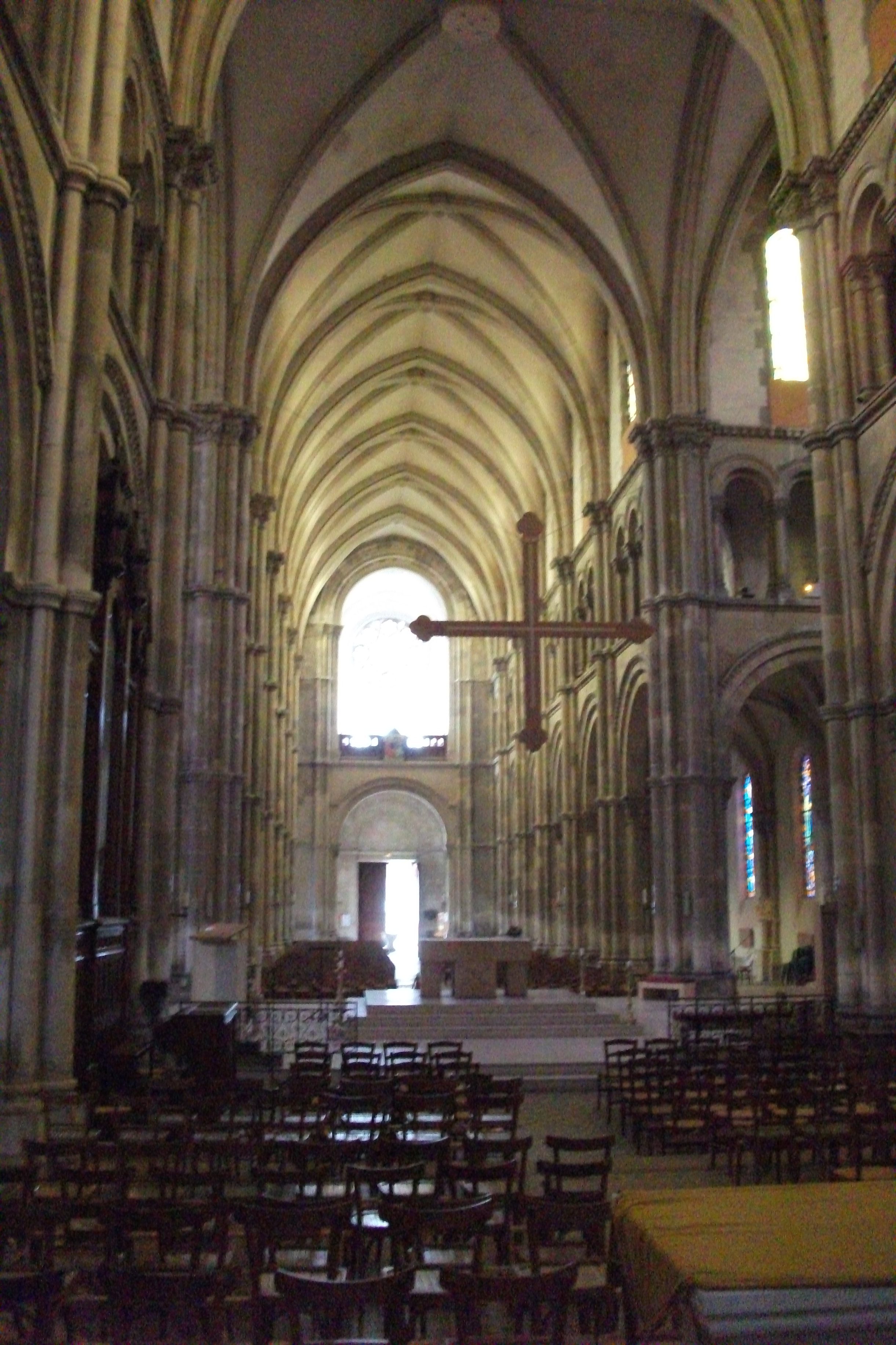 Nef de l'église.